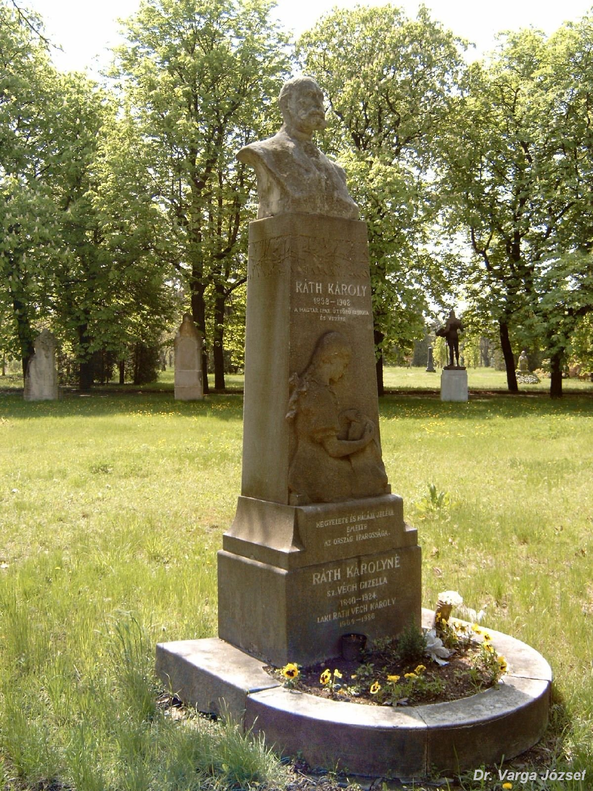 Ráth Károly (Szeged, 1838. júl. 6. – Bp., 1902. máj. 1.): ipari úttörő, Ráth György és Ráth Mór öccsének sírja Budapesten. Kerepesi temető: 29/1-1-22 [szobrász: ifj. Mátrai Lajos, építész: Hikisch Rezső].